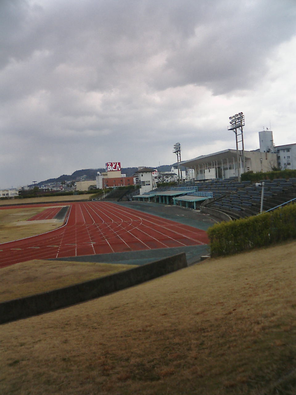 香川県立屋島陸上競技場.JPG。 - 日本国香川県高松市にある競技場。